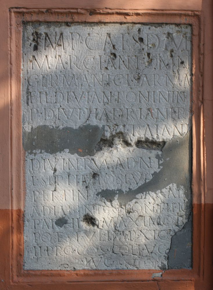 Római kori kőtábla Crumerumból (Nyergesújfalu, Komárom-Esztergom megye) CIL III 3664 = CIL III 10602 = RIU 3, 749: Imp(eratori) Caes(ari) divi / Marci Antonini / Germanici Sarma(tici) / fil(io) divi Antonini ne/p(oti) divi Hadriani pro/n[e]pot[i] divi Traiani / Part[hici abnepoti] / divi Nervae adnep[oti] / L(ucio) Septimio Sever[o] / Pertina[ci A]ug(usto) Arabic(o) / Adiabenico pontifici (maximo) / Parthico maximo trib(unicia) / potest(ate) VI imp(eratori) XI co(n)s(uli) / II proco(n)s(uli) coh(ors) V C[all(aecorum)] / Luc(ensium) Anton(iniana).